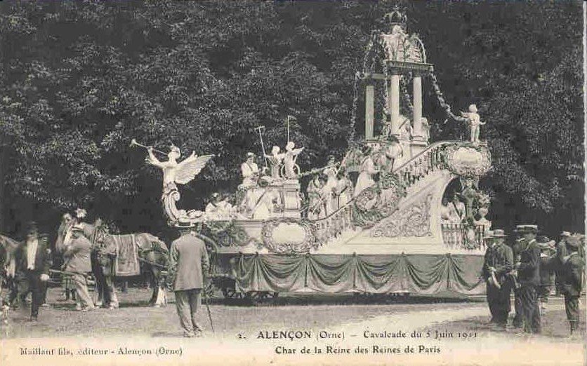 Le Char de Jeanne Quéru, Reine des Reines de Paris 1911, à la Cavalcade du 5 juin 1911 à Alençon.